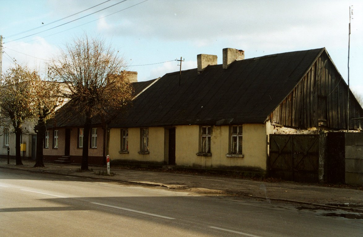 Old worker houses in Opatówek